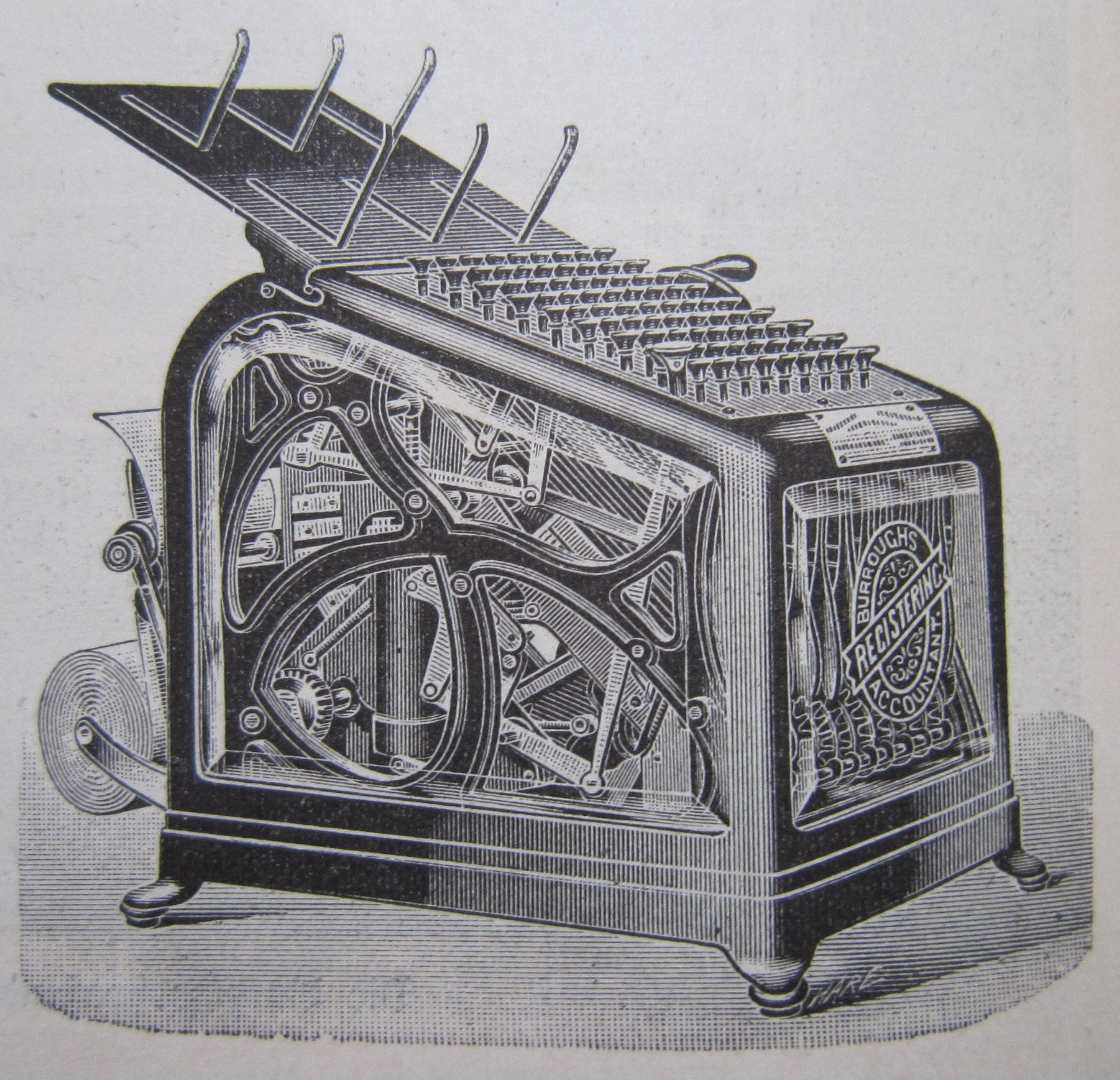 Burroug's Additionsmaschine